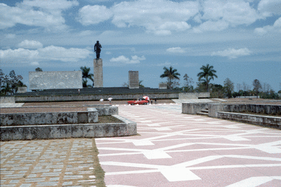 Zelf gemaakt April 2002. Het mausoleum van Che Guevara in Santa Clara